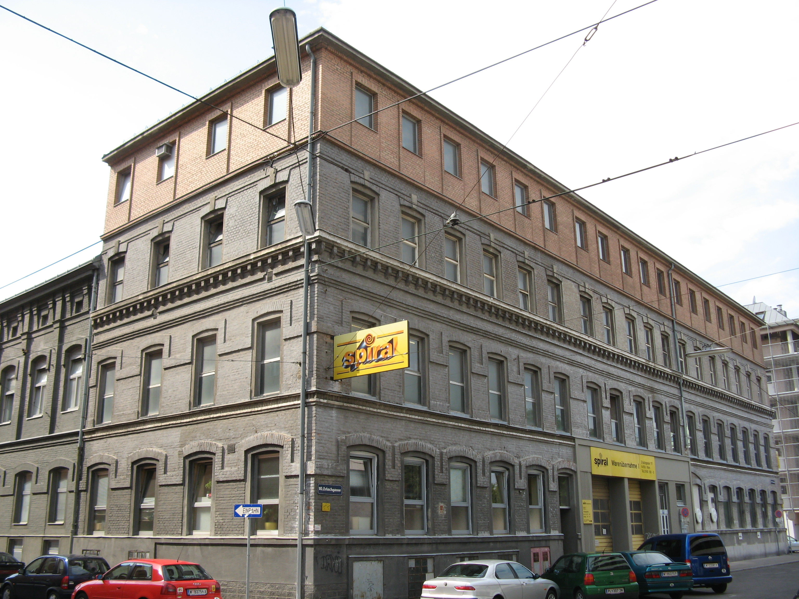 Fabrikgenäude (Ende 19. Jh.), Erlachgasse 117, Wien-Favoriten